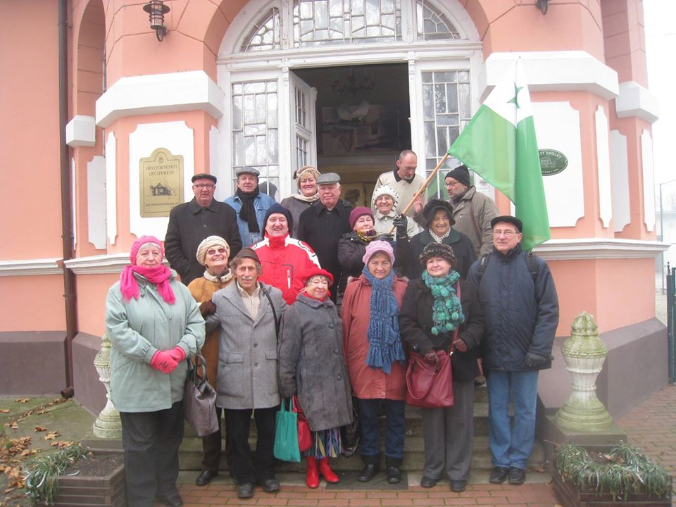 A Helytörténeti Múzeum Dombóvár anyagának megtekintése budapesti eszperantistákkal